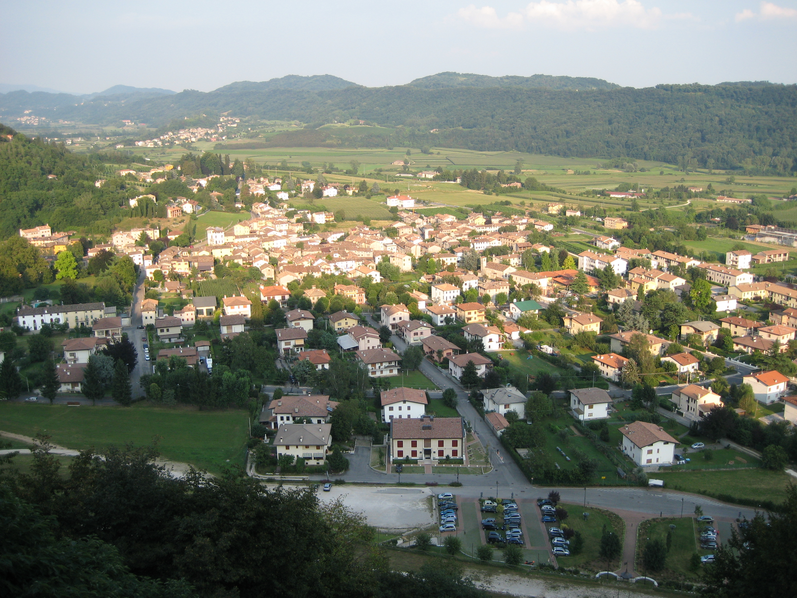 Cison di Valmarino vista da Castelbrando